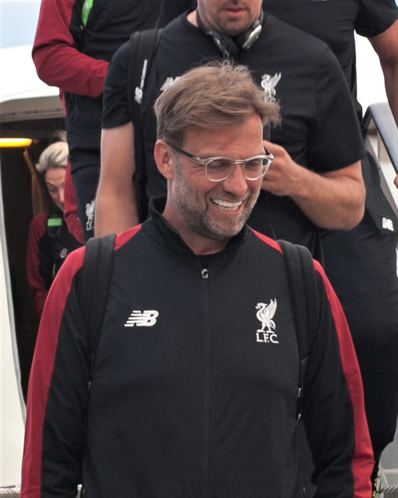 Команда ФК «Ливерпуль» прибыла в Киев, 2019 A cropped, straightened, and enhanced version of the original file found at